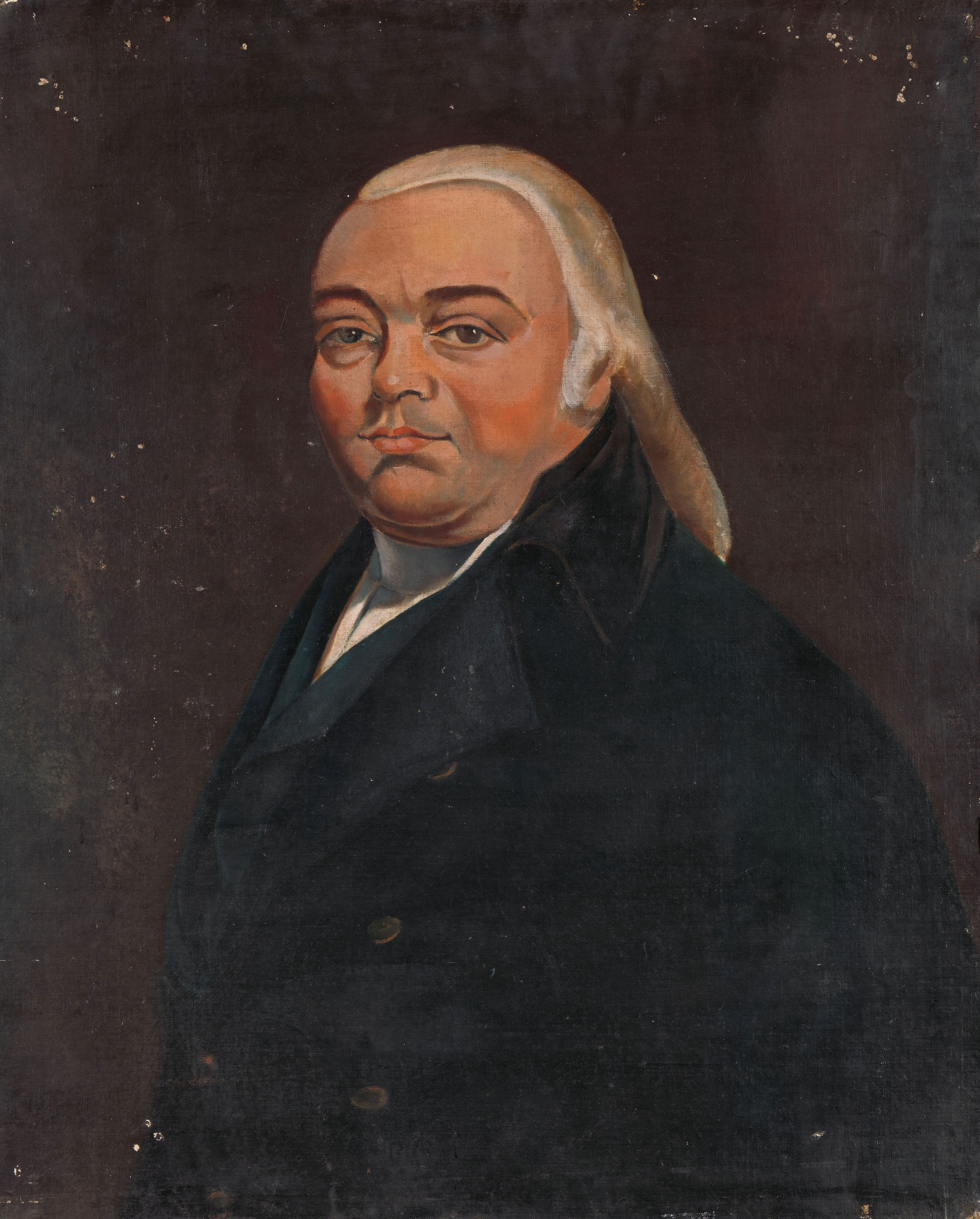 Portret van Sebastiaan Cornelis Nederburgh (1762-1811). Commissaris-generaal (1791-99). Buste naar links, het gelaat naar de beschouwer gekeerd. Kopie door Cornelis de Cocq uit 1862 naar het onbekende origineel uit 1800. Onderdeel van een reeks van portretten van de gouverneurs-generaal van het voormalige Nederlands Oost-Indië. Collection: schilderijen; Gouverneurs-generaal serie